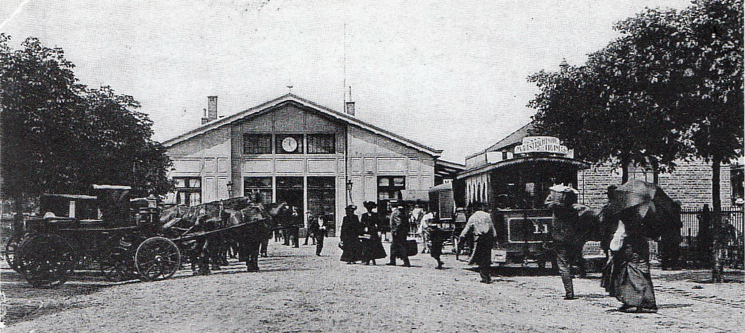 Zicht op het tijdelijke Station Maastricht Staatsspoor in Maastricht in 1910. Het station was gebouwd van hout (in chaletstijl) om snel te kunnen worden afgebroken (het lag in de vestingwerken). In 1913-15 werd het huidige, permanente station gebouwd. Fotocollectie RHCL, GAM 1367.